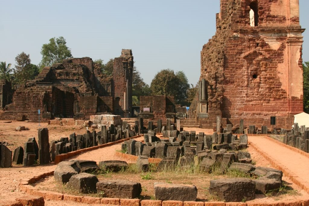 Velha Goa, Goa 403110, India